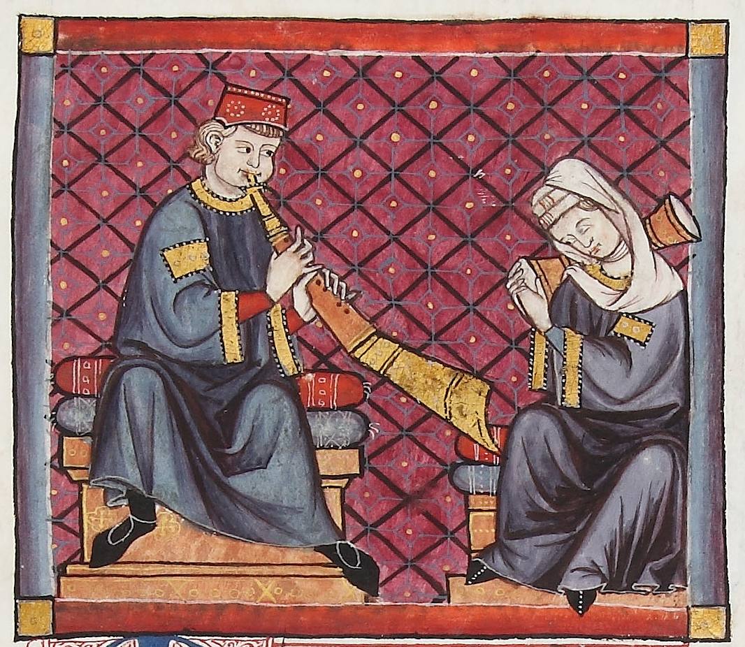 Ilustracón dos manuscritos das catigas de Sta. María. Século XIII-XIV